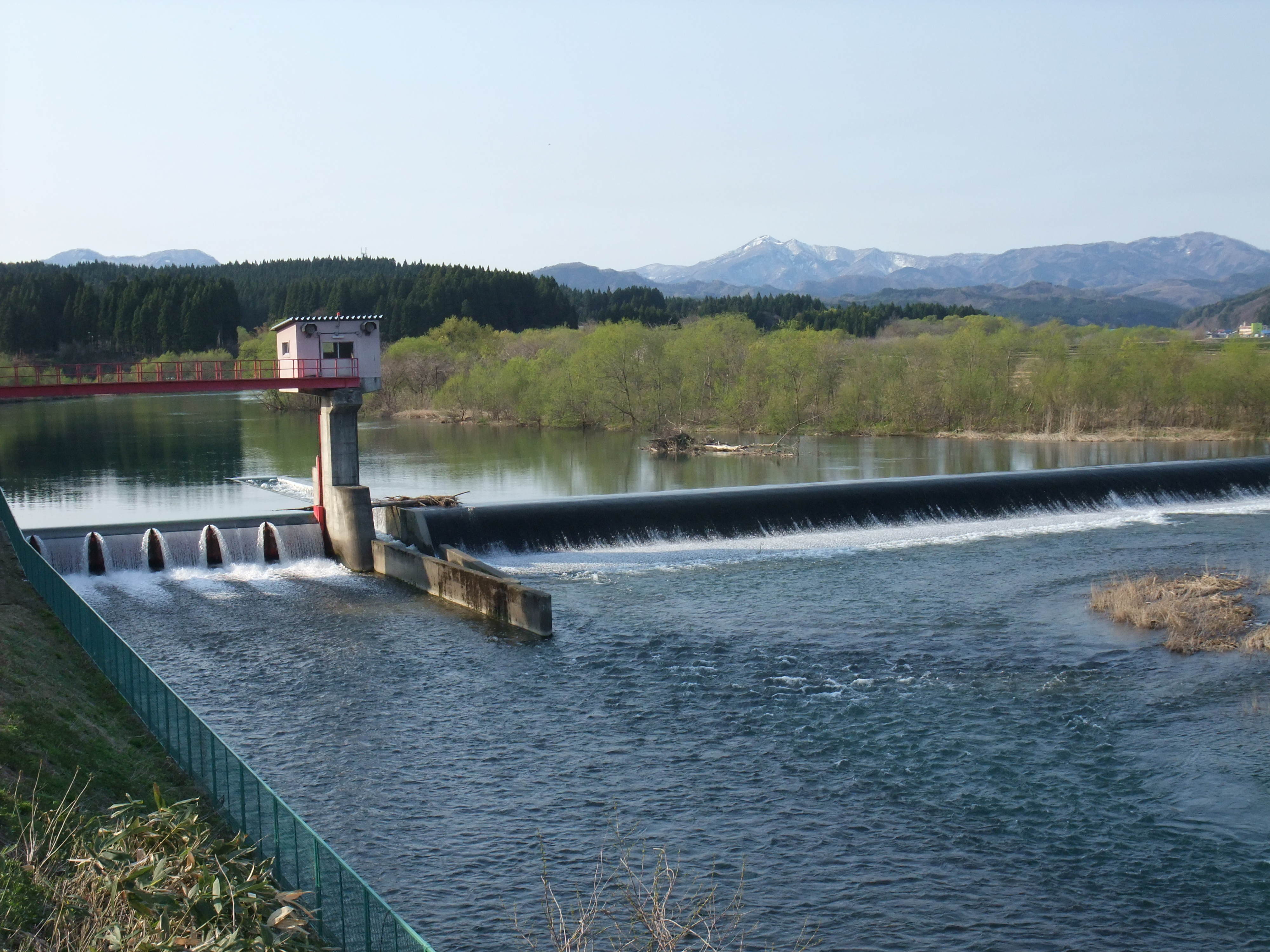 藤琴川 矢坂堰堤